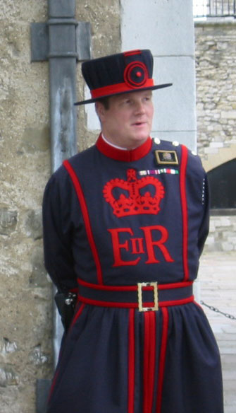 Yeoman Warder - "Beefeater" i sin tradisjonelle røde uniform fra Tudortiden. Foto: Kjetil Bjørnsrud 2002